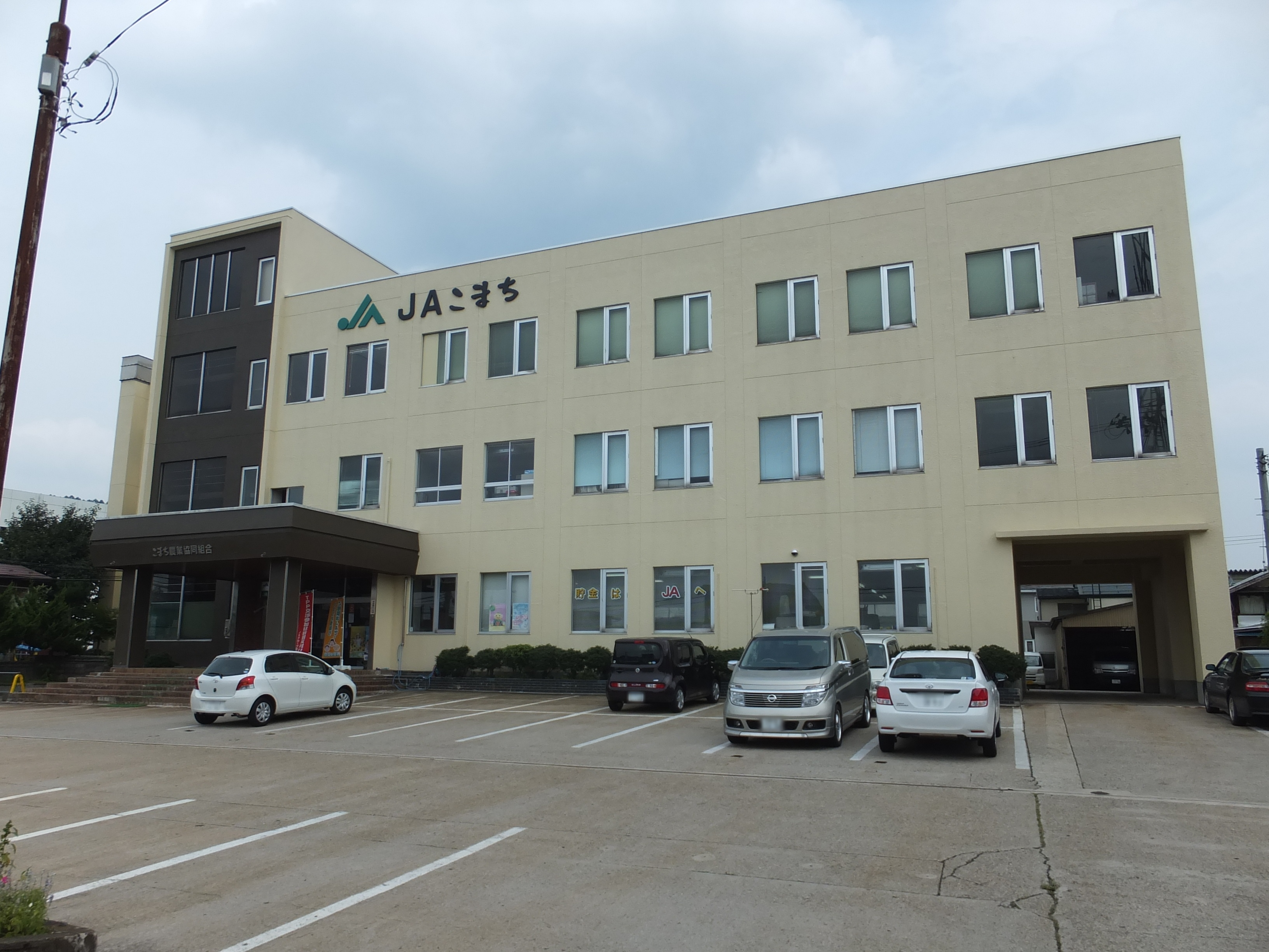 JAこまち（秋田県湯沢市）